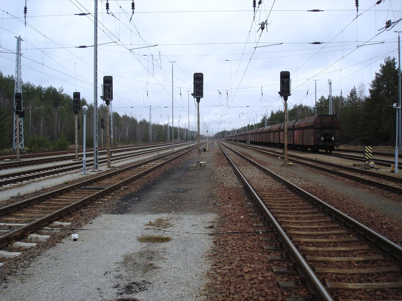 Übergabebahnhof der DB an Vattenfall